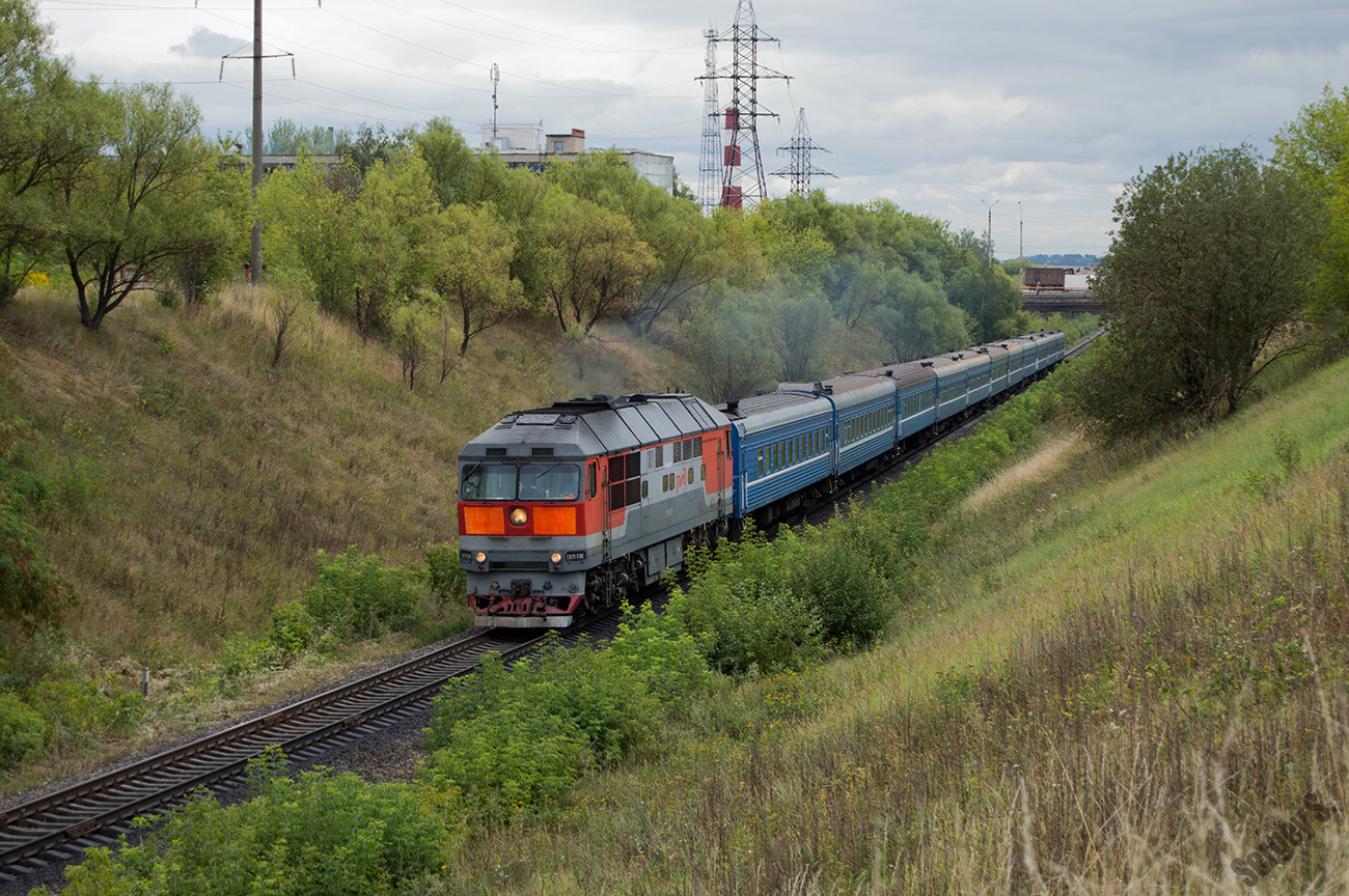 С завода поступил в депо Основа (Южной ж. д.) 29.5.1993 г. — передан в депо Старый Оскол (Юго-Восточной ж. д.) КР-2 Воронежский ТРЗ 01.2013 г.